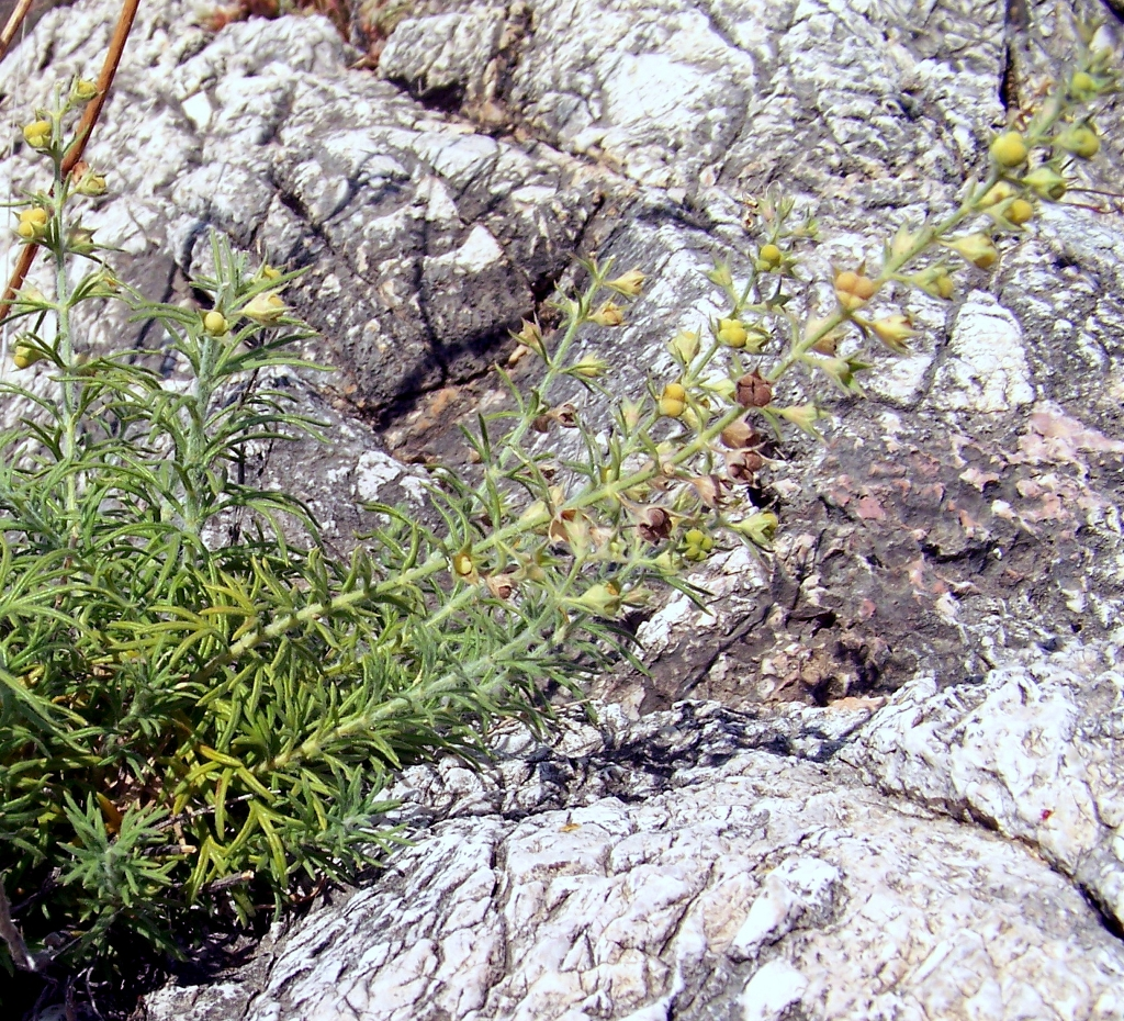 Teucrium pseudochamaepitys (Pinillo bastardo, Yerba de la Cruz) : Individuo en fructificación, con núculas inmaduras y maduras - Cabezo de las Fuentes/de los Ojales, Albatera (Alicante, España).